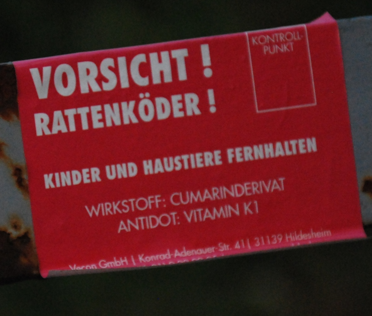 Aufkleber zur Warnung vor Rattenködern